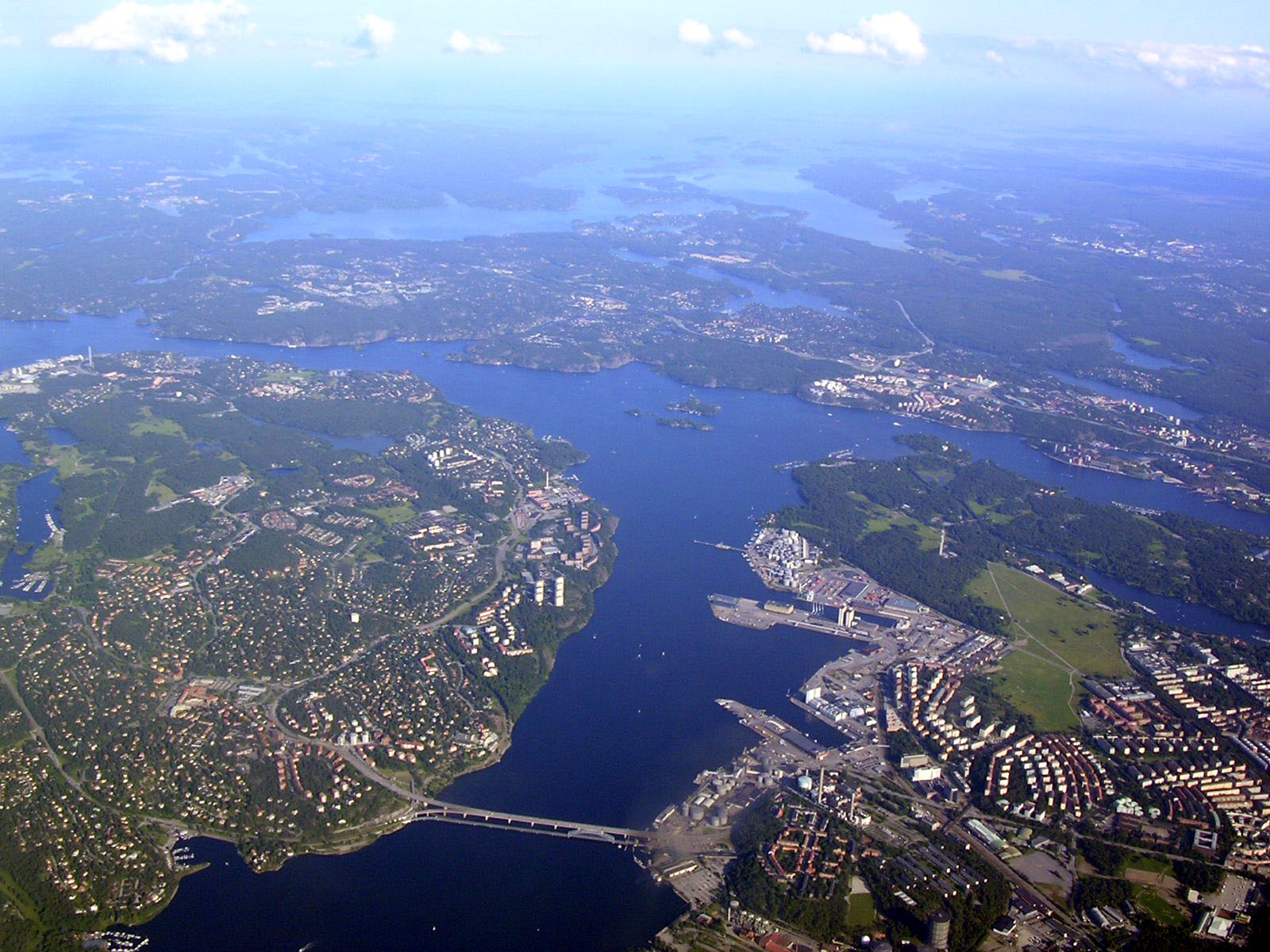 Lidingö till vänster, Östermalm, Gärdet och Djurgården till höger.